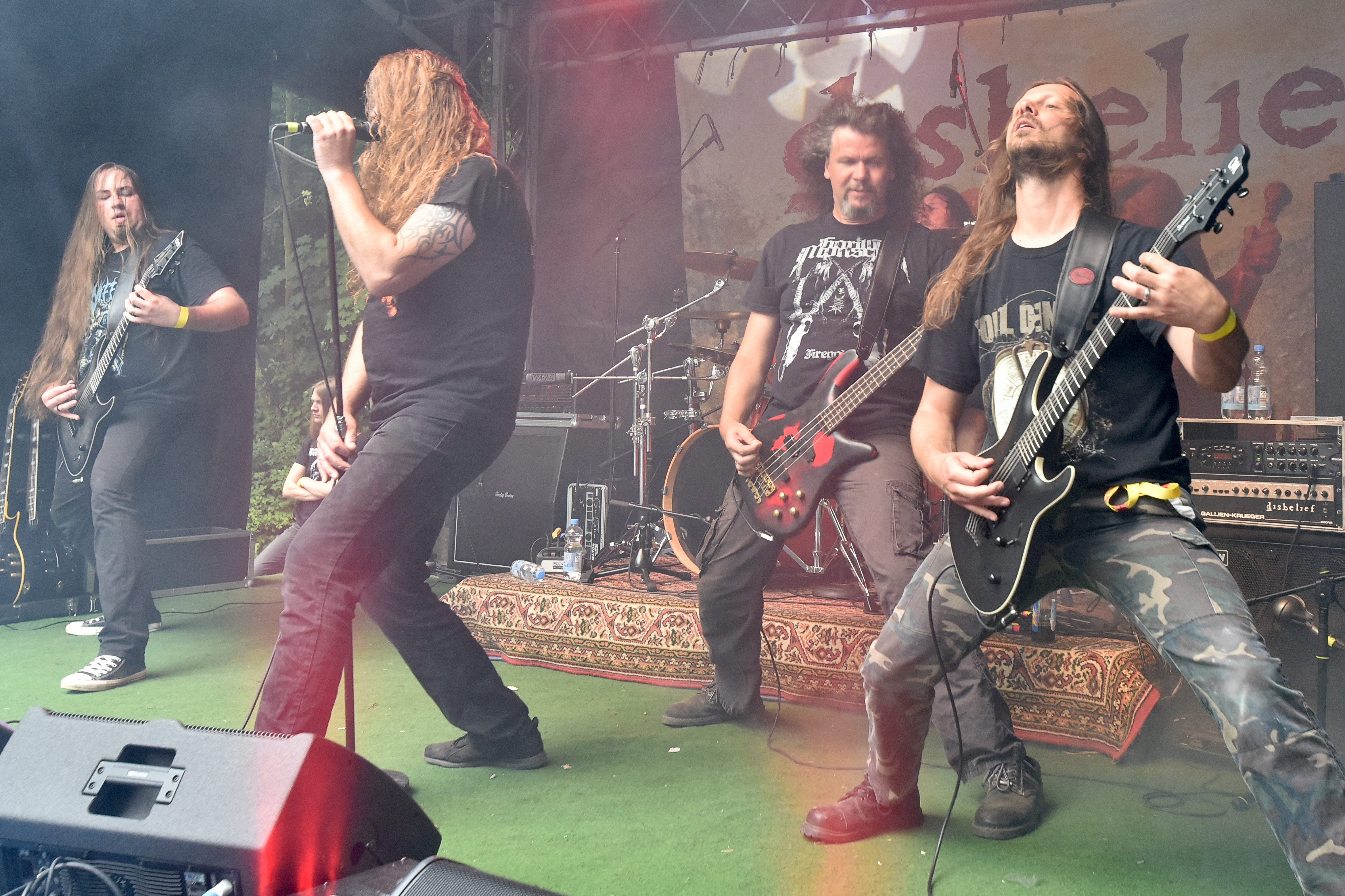 Disbelief bei Rage Against Racism 2017 in Duisburg